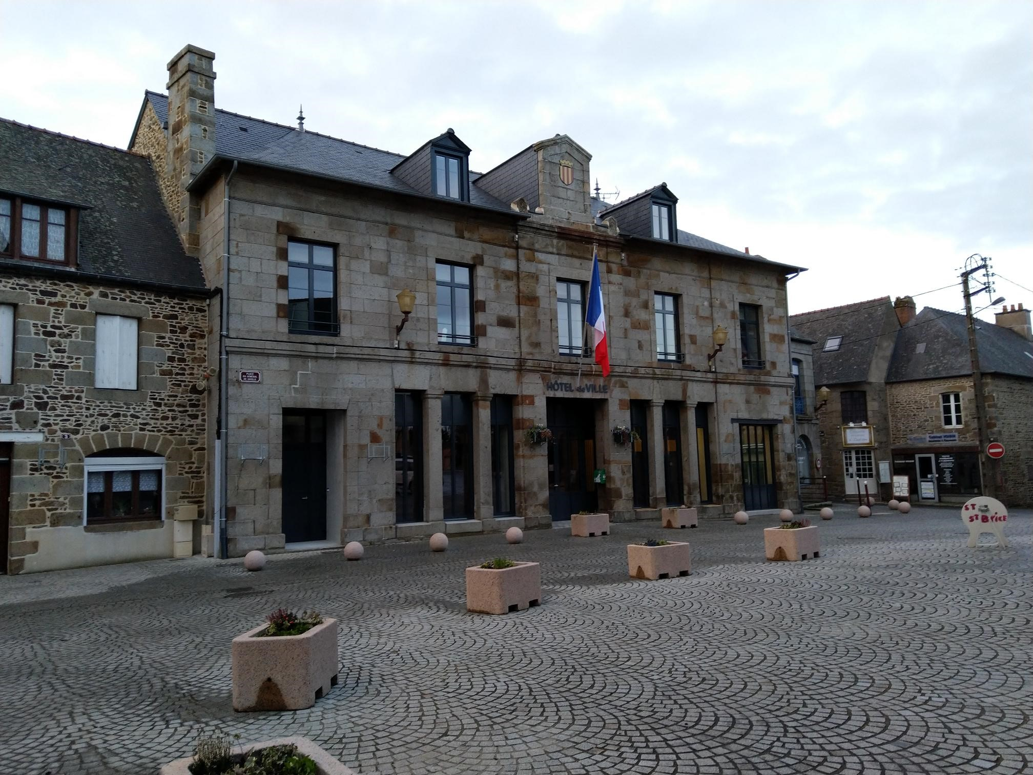 Nouvel hôtel de ville de Maen Roch. Architecte : Charles Langlois. 1853.